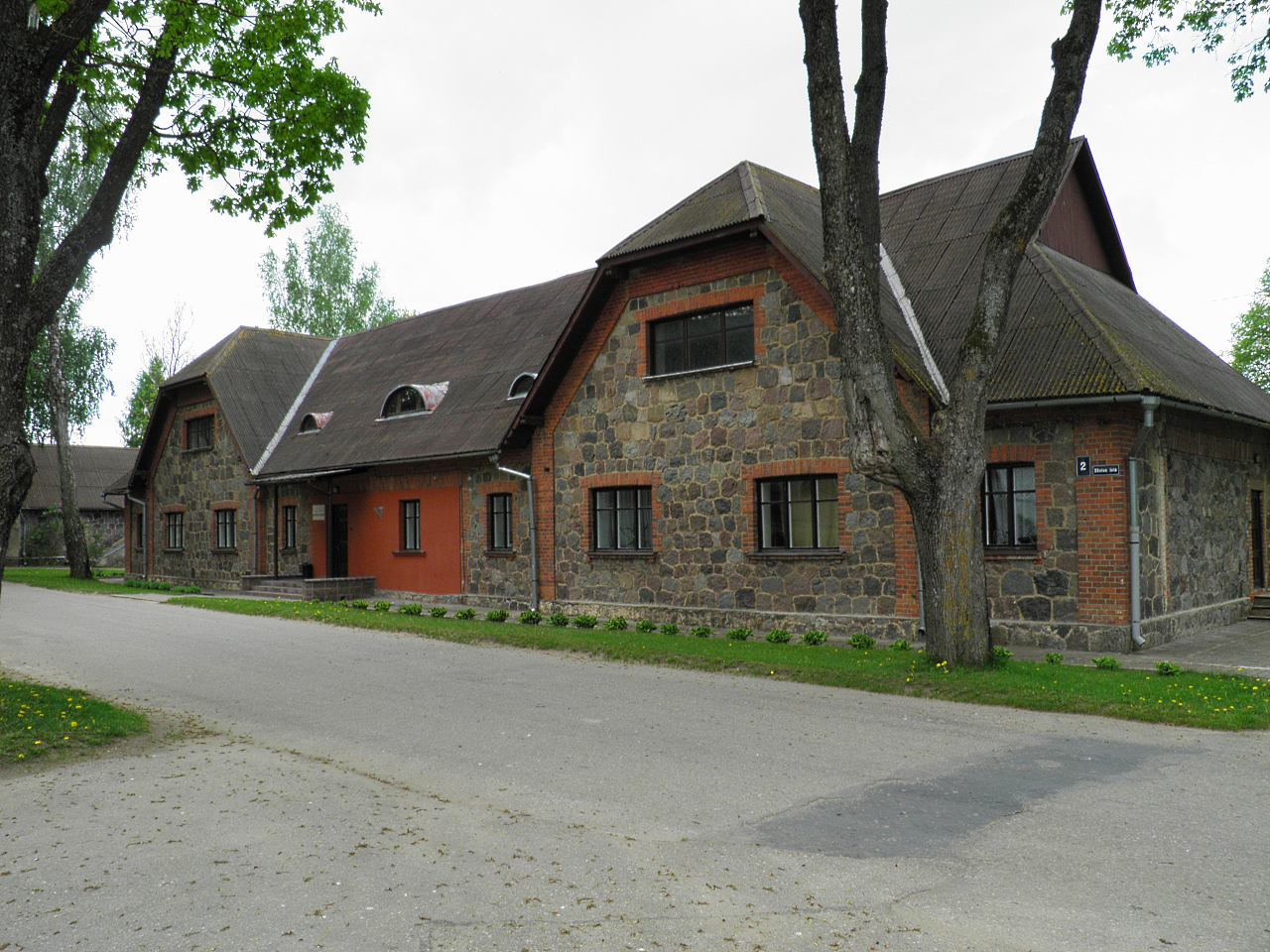 дом культуры